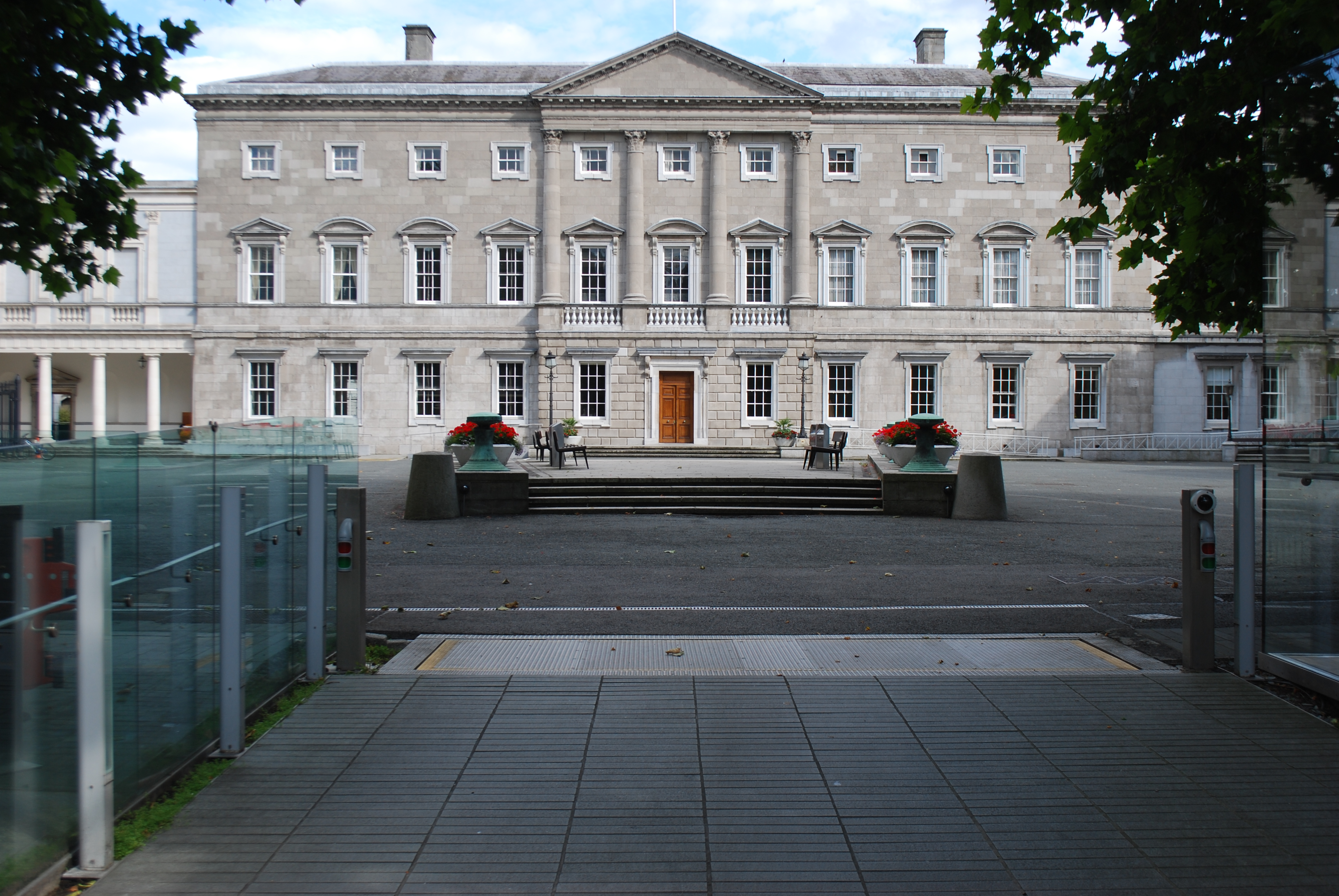 Vue de Leinster House, à Dublin.